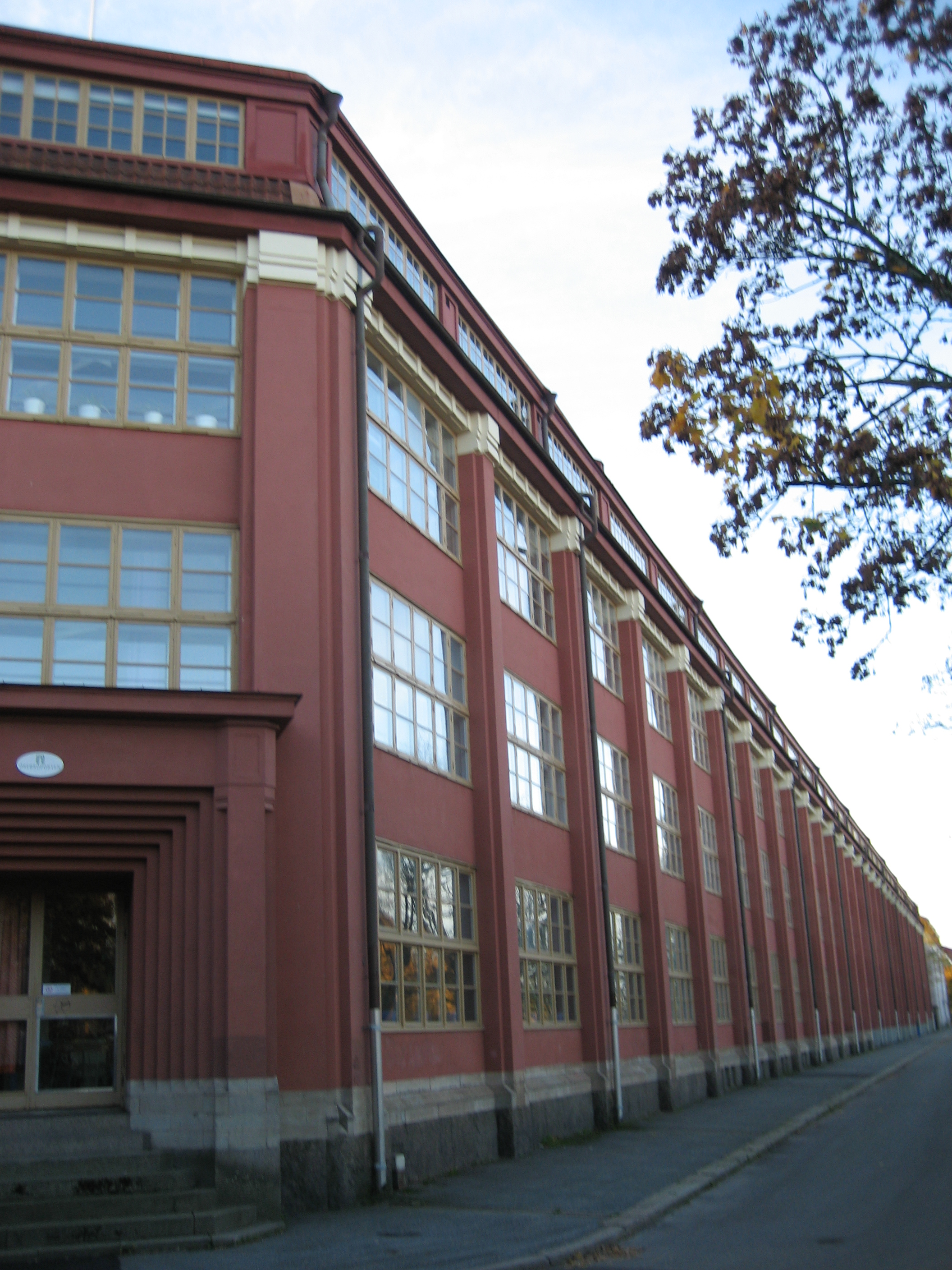 Virginska skolan, Örebro, Sweden